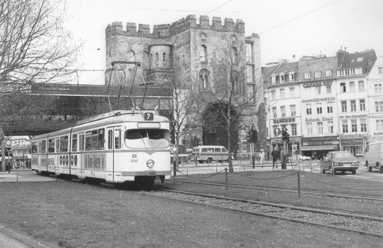 Achtachser der Linie 7 am Hahnentor